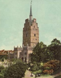 Kröpeliner Tor, Hansestadt Rostock